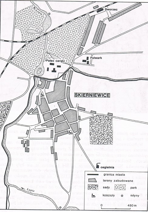 Zabudowa - plan miasta w 1883 roku